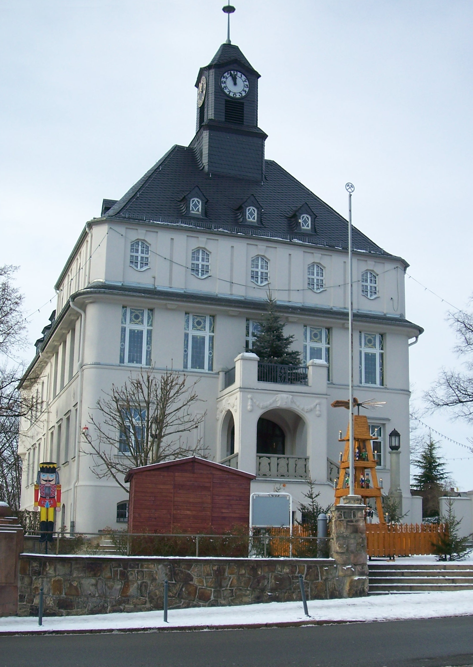 Rathaus von Lugau / Erzgebirge